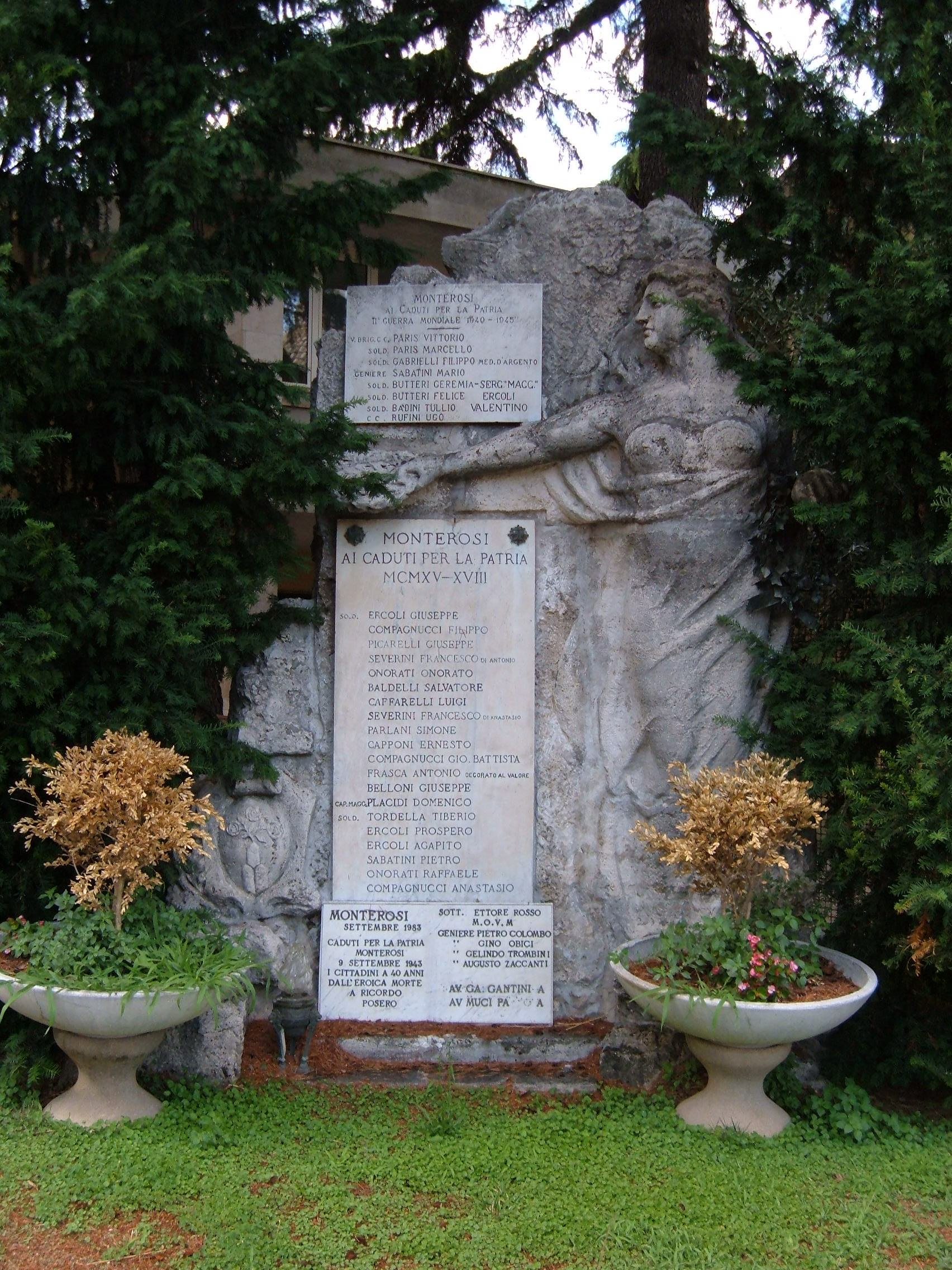 Monterosi